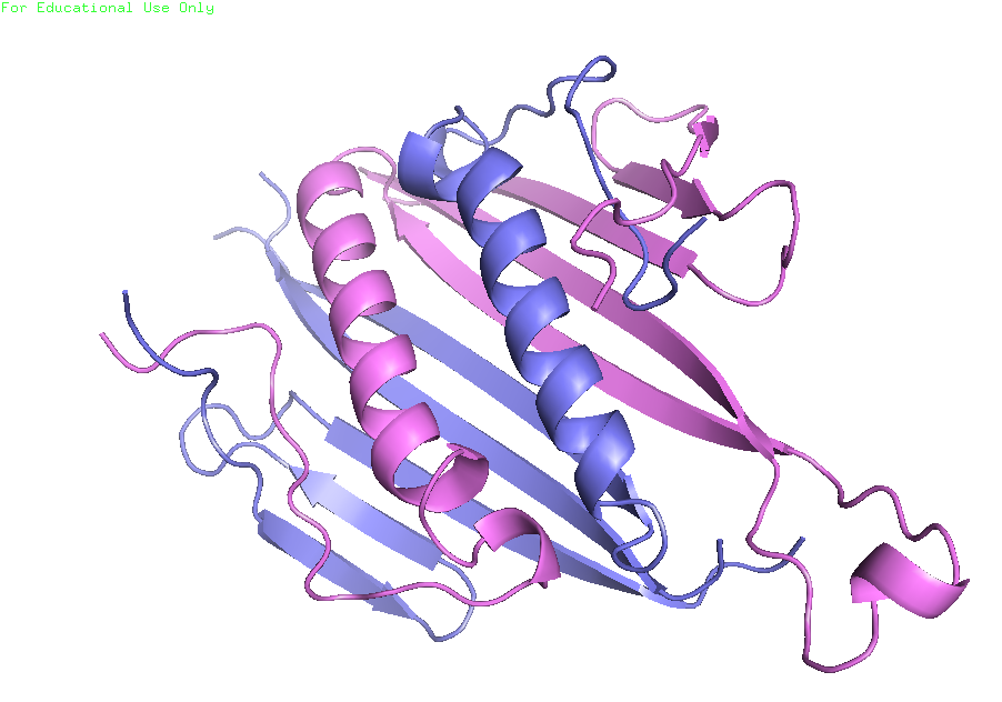 AP205 bakteriofāga apvalka proteīna kristālstruktūra